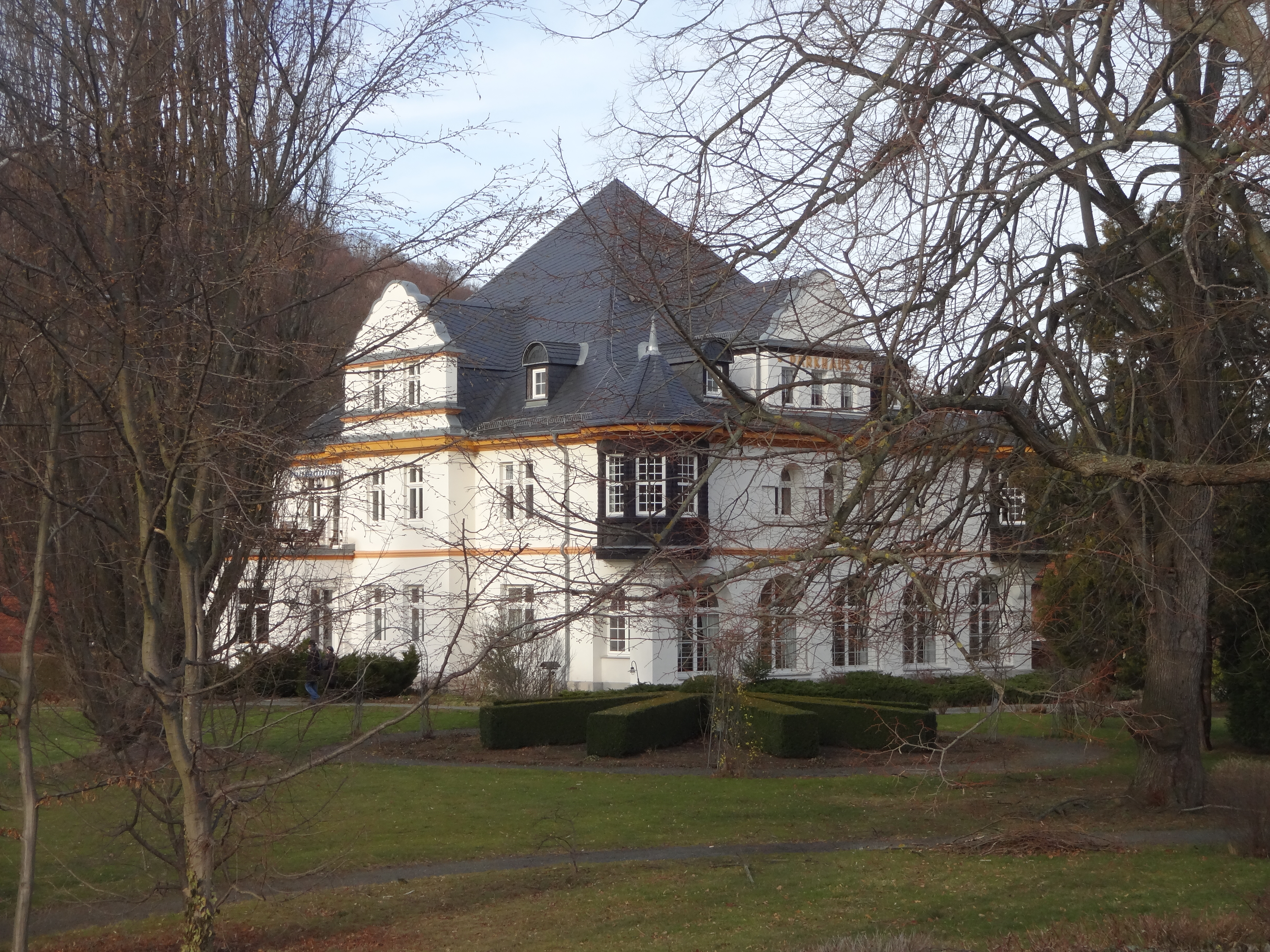 ehemals denkmalgeschützte Villa in der Burgmühlenstraße 14 in Wernigerode